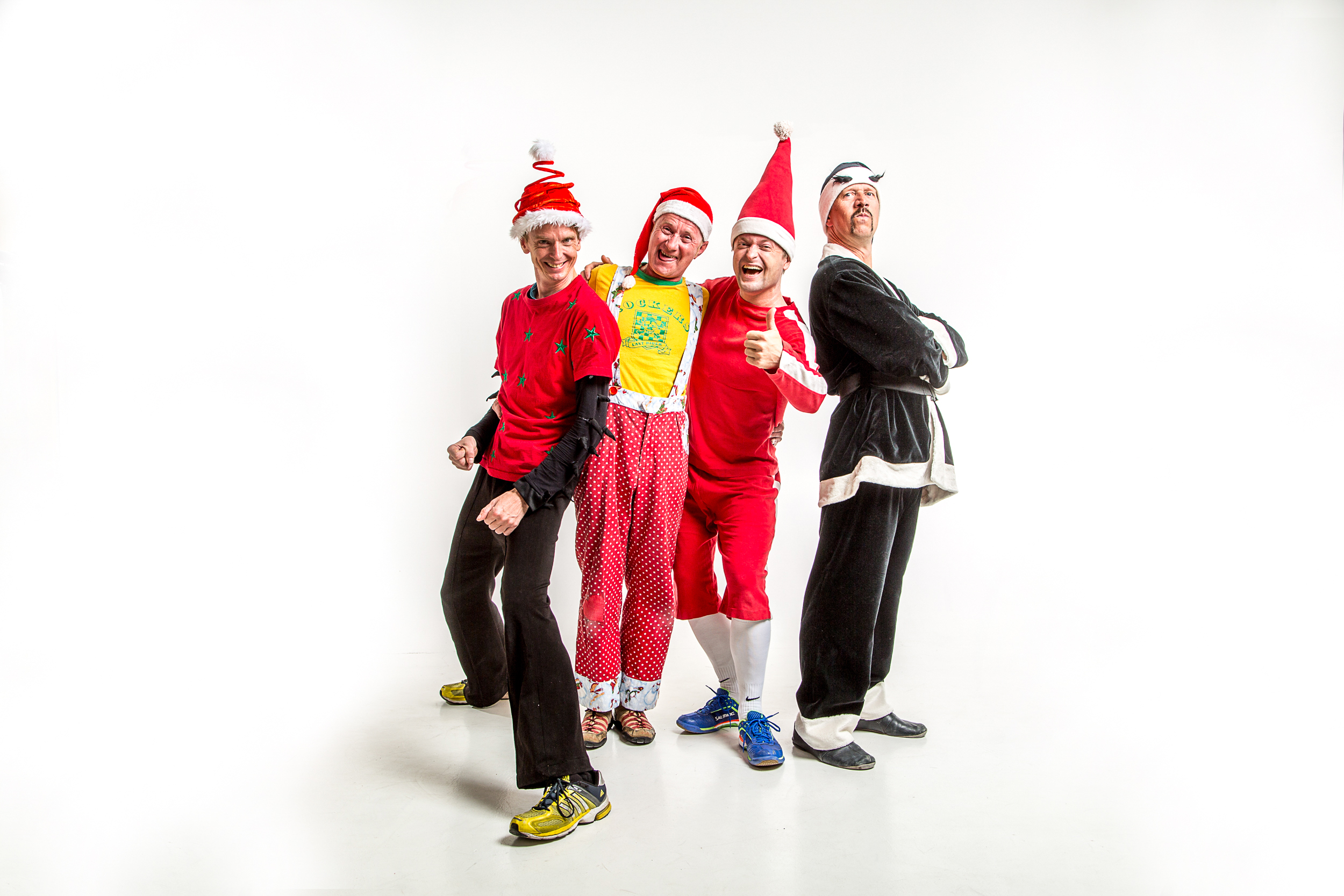 Bildet tilhører Svartnissen AS